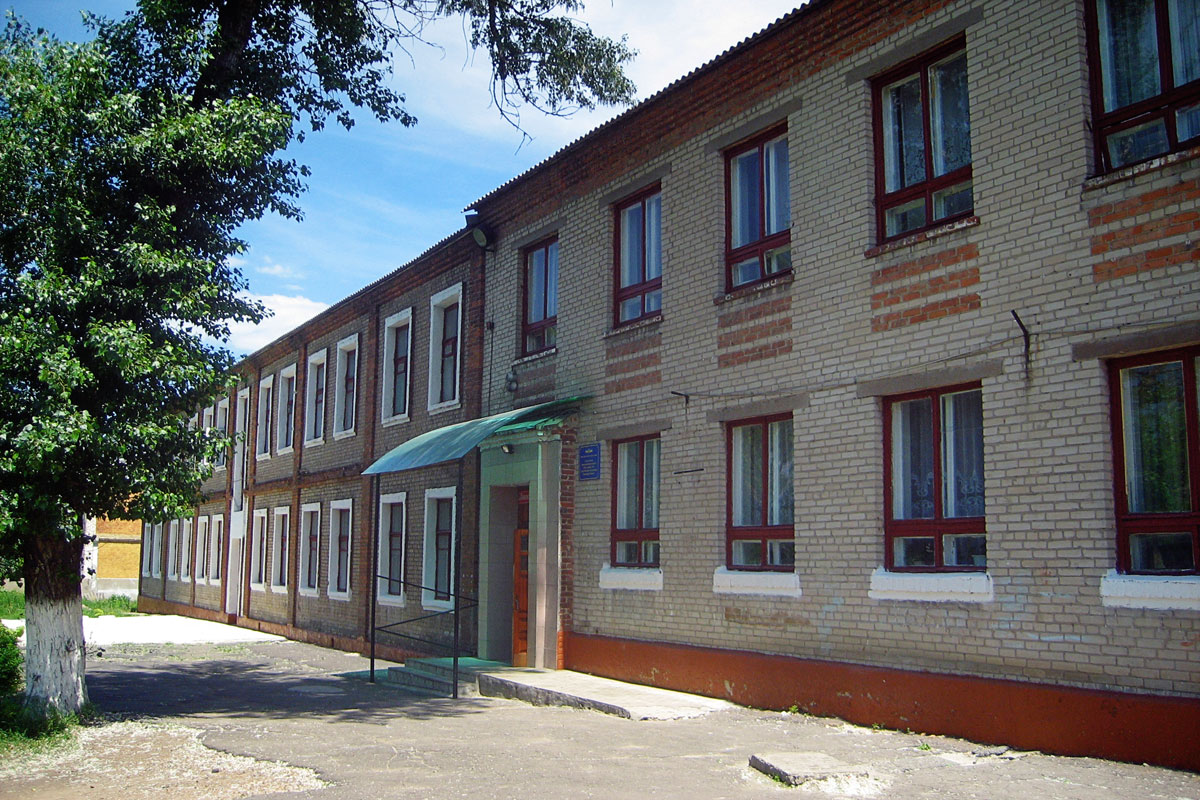 Біля входу